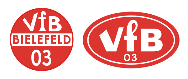 Historisches Wappen des VfB Bielefeld